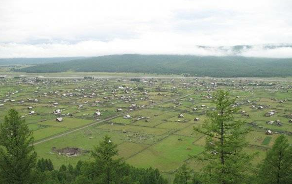 Санага